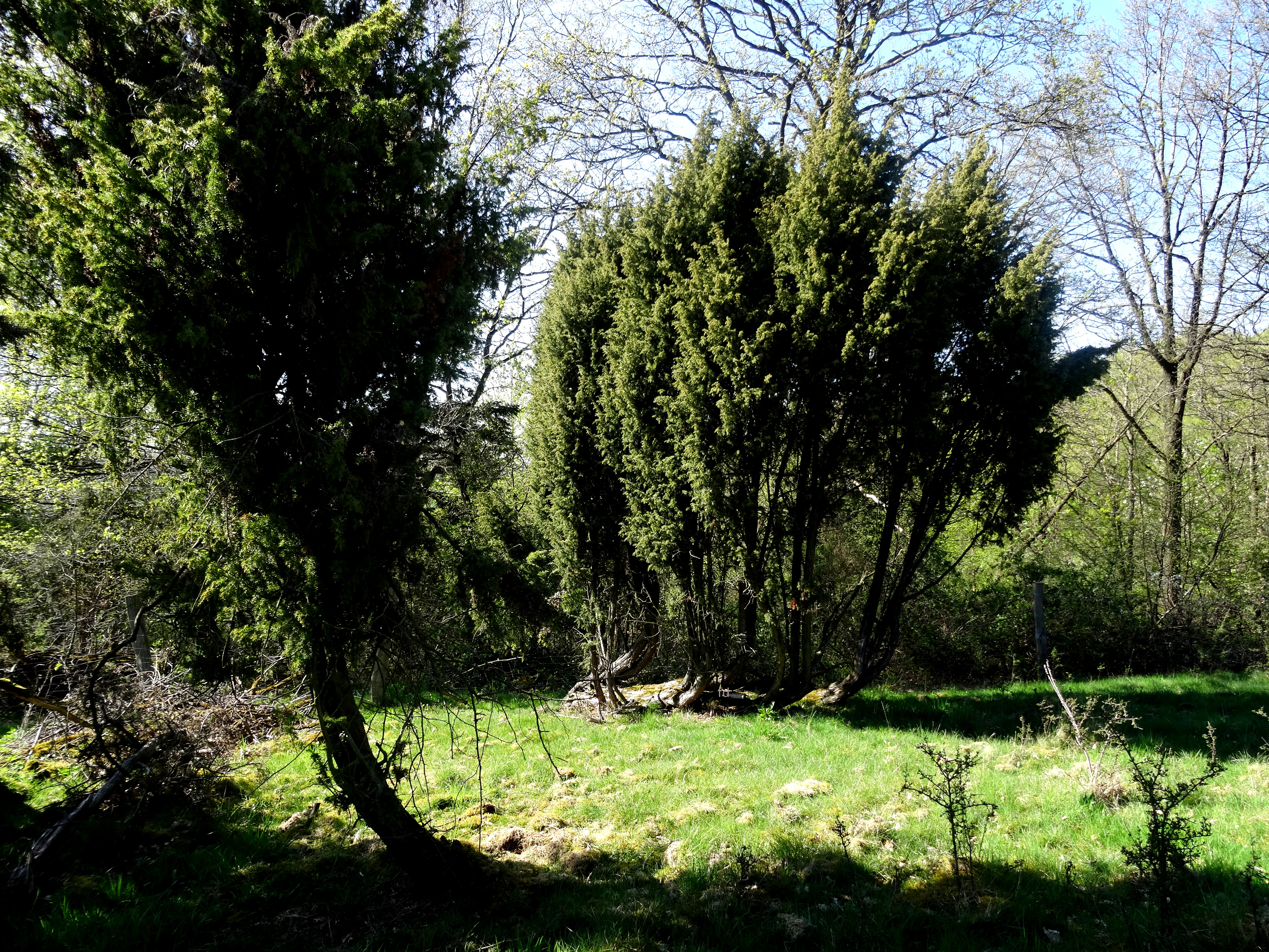 Wacholder (Juniperus communis) im Naturschutzgebiet „Am Bocksbart“ (HSK-004) in Meschede, südlich vom Ortsteil Wallen